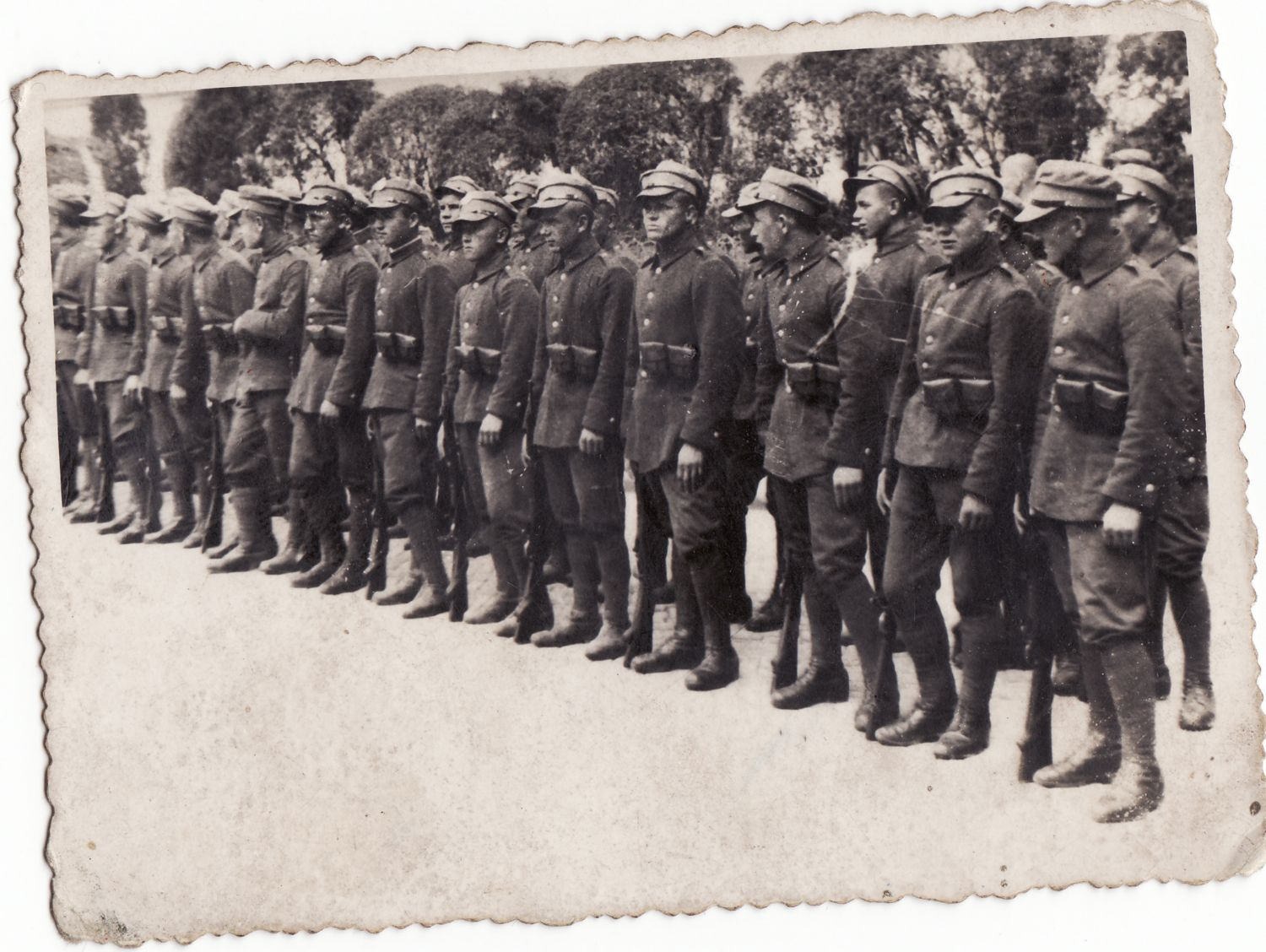 Żołnierze kadry 9 batalionu pancernego